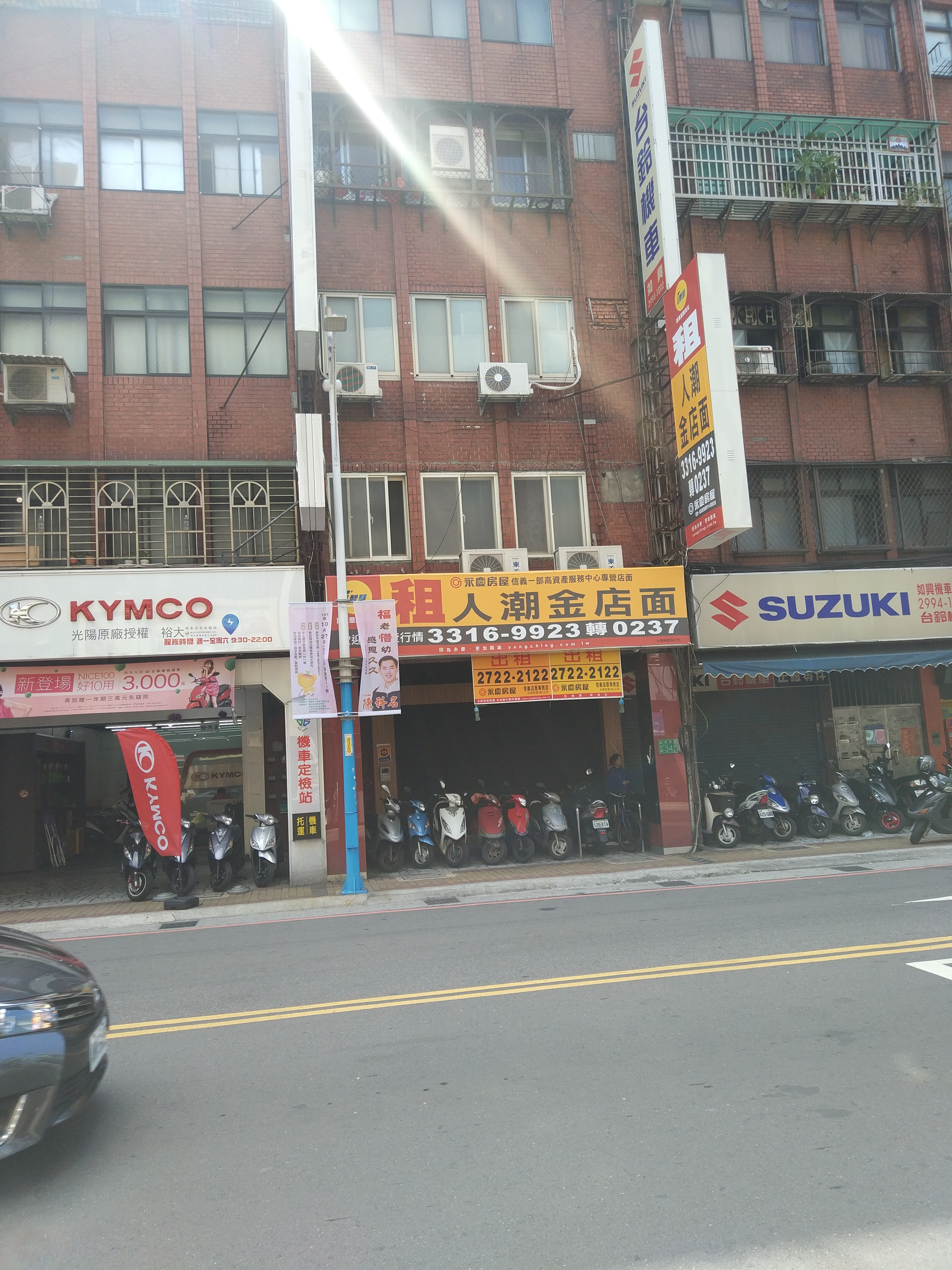 新北市新莊區新泰路341號1樓等待出租的金店面，貼永慶房屋廣告。